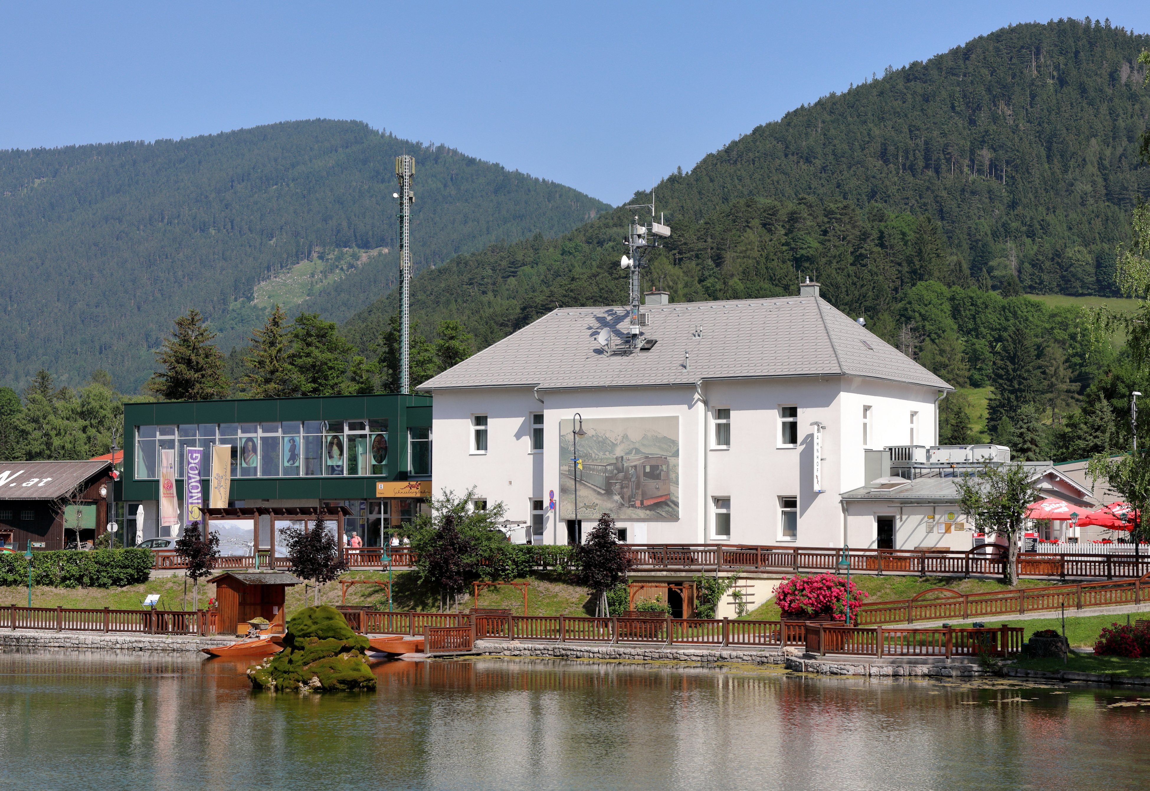 Bahnhof der niederösterreichischen Marktgemeinde Puchberg am Schneeberg mit dem Bahnhof-Tourismusportal linksseitig und davor dem Kurpark. Der Bahnhof wurde 2014/2015 umgebaut und saniert. In diesem Zuge wurde auch ein Bahnhof-Tourismusportal nach Plänen des Architektenteams Karl Rudischer und Martin Panzenböck errichtet. Die Gesamtkosten betrugen rund 2,3 Mio. Euro und die feierliche Eröffnung fand am 23. Mai 2015 statt.